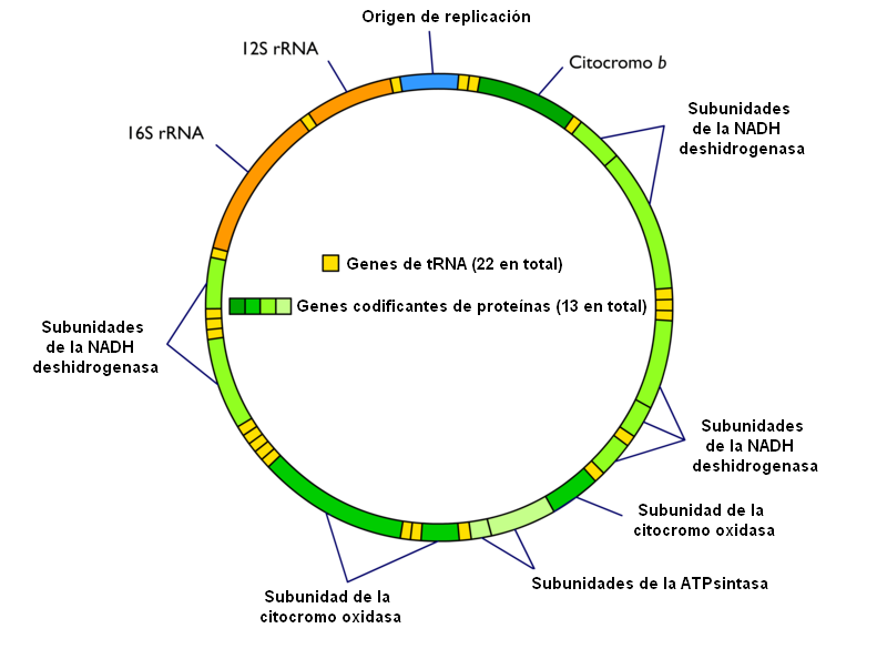 Adaptación al castellano del esquema en blanco del genoma mitocondrial disponible en Commons. Creación propia de uso libre.